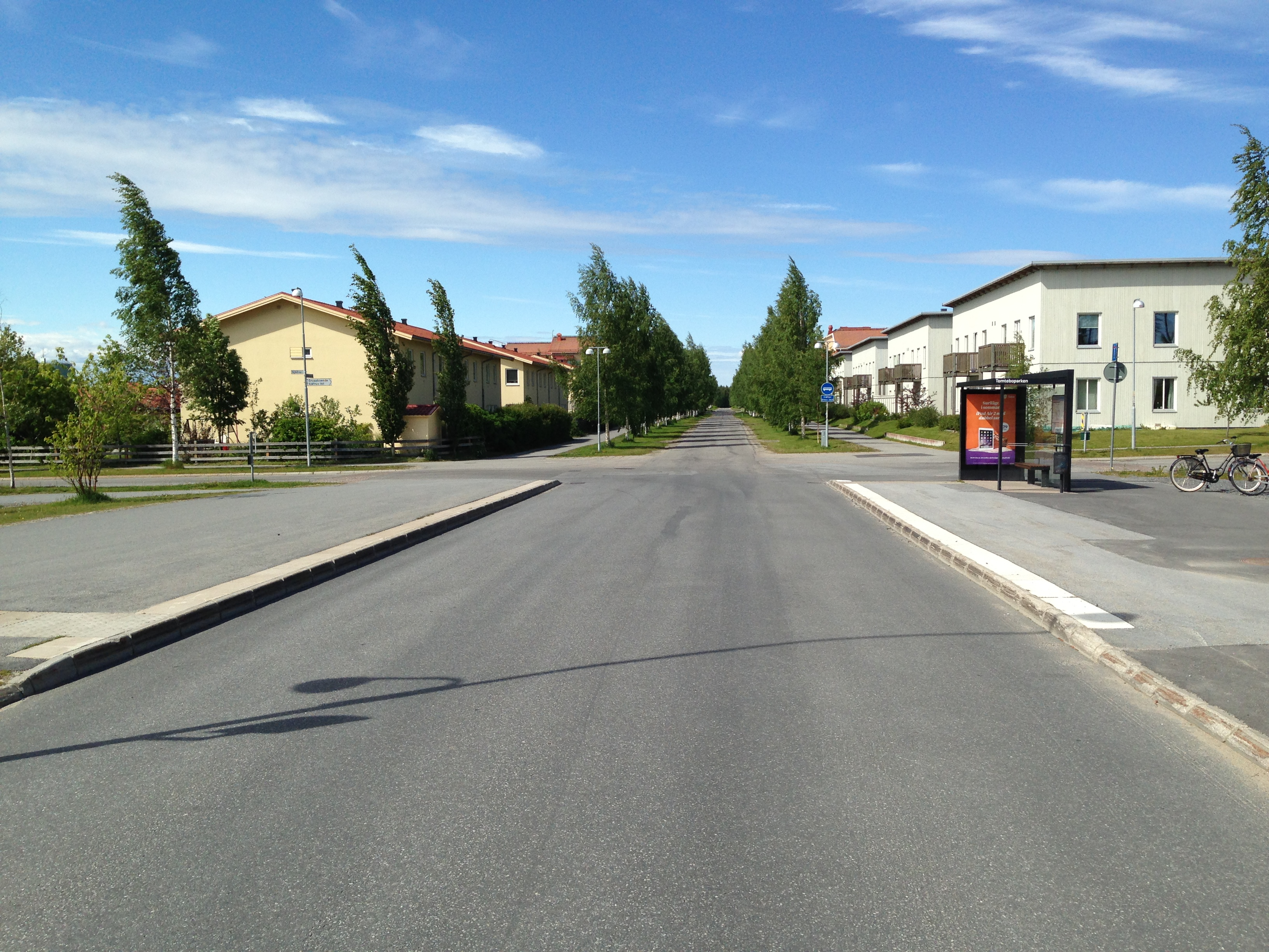 Bussvägen i Tomtebo. Hållplats Tomteboparken